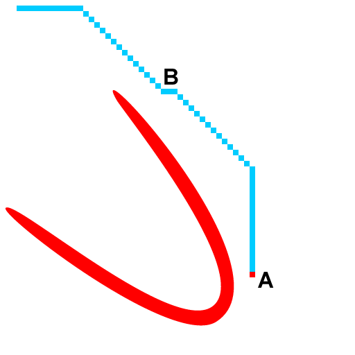 Zuerst wird der Punkt A expandiert und dann B